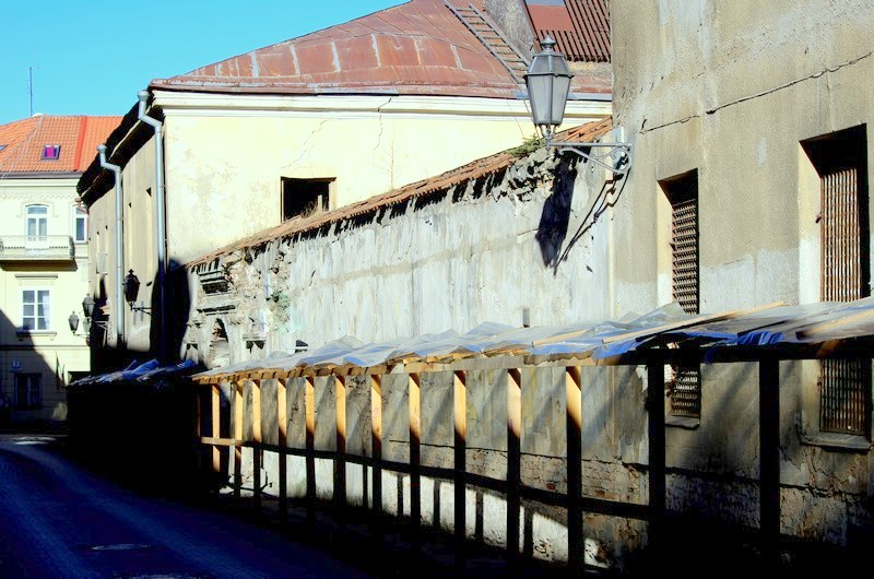 Bokšto gatvė